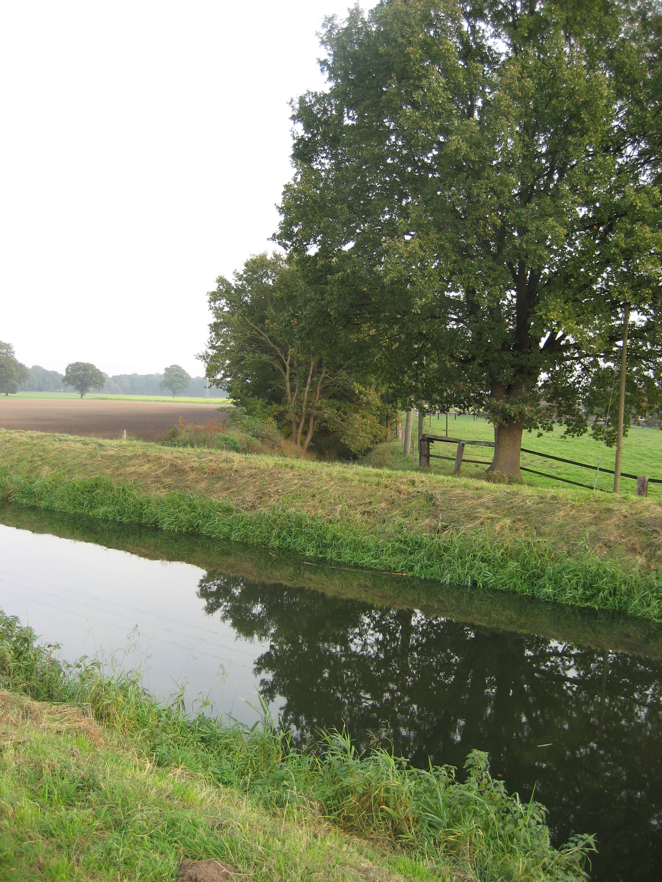 Klever Landwehr, bei Obrighoven, Issel vor ihrem Abknick bei der Bärenschleuse